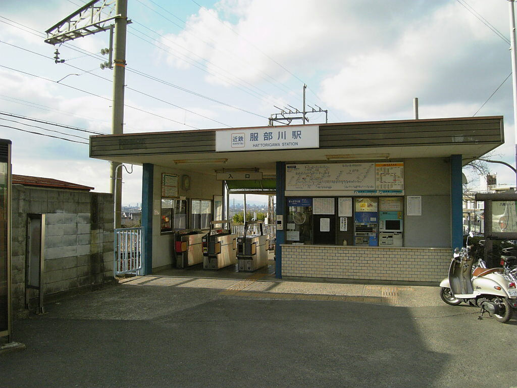 近鉄服部川駅 2007年1月14日撮影。 機材：V604SH 撮影者：Kansai explorer